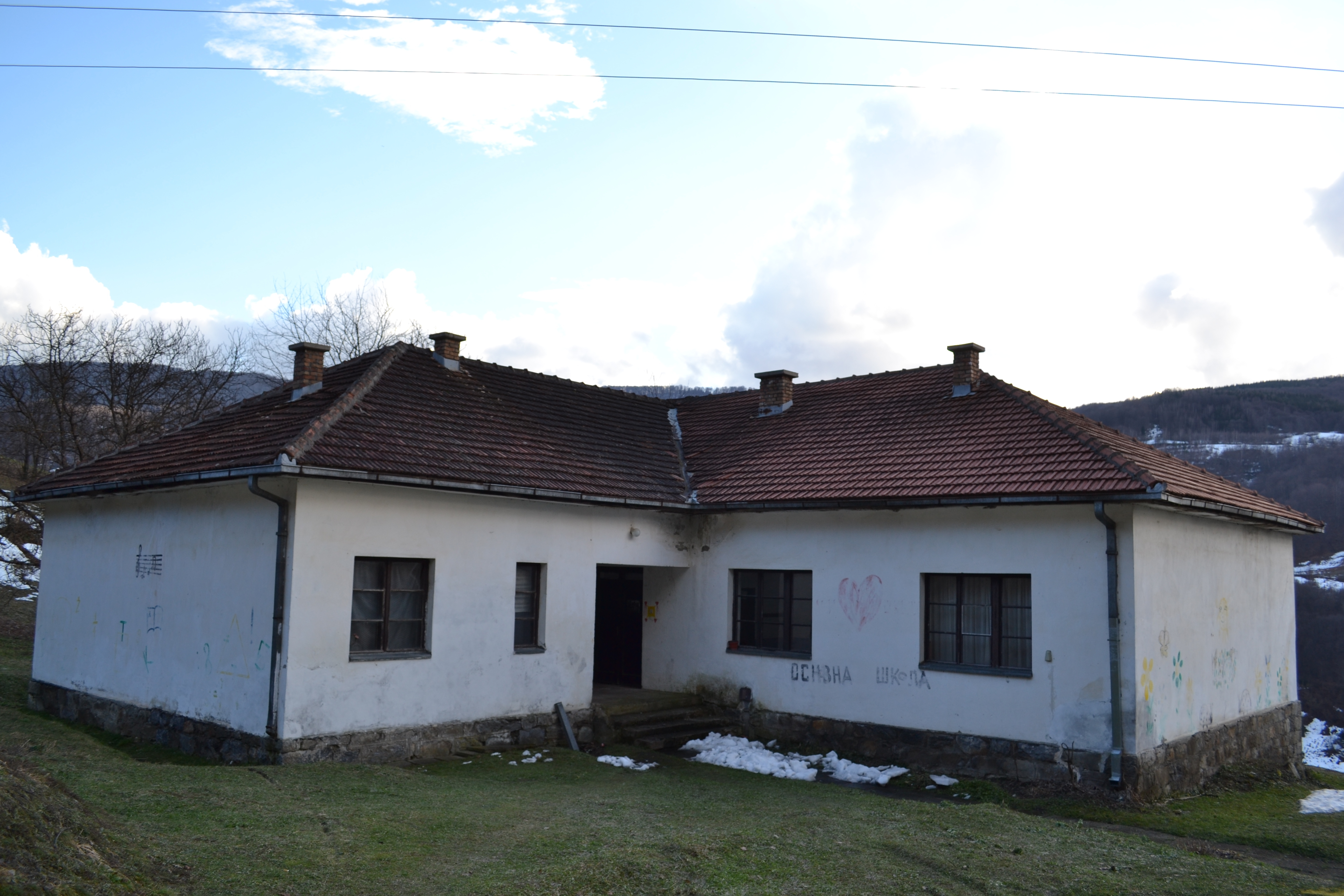 Škola u Bugoželji